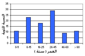 أربيد اربد